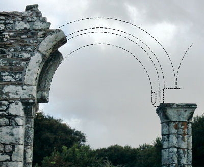 Chapelle de Languidou : extrapolation des arcs de la nef